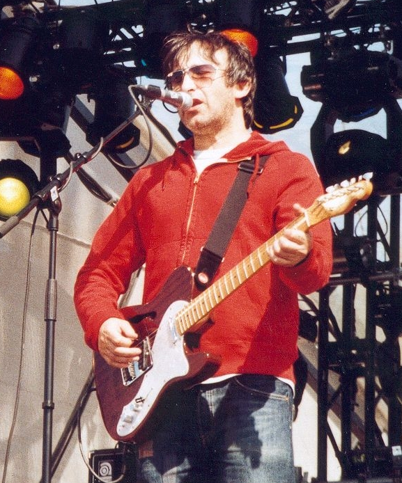 Ian Broudie, Eröffnungsfest Fußball-WM 2006 in Hamburg